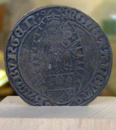 Luebische Mark, Hanse